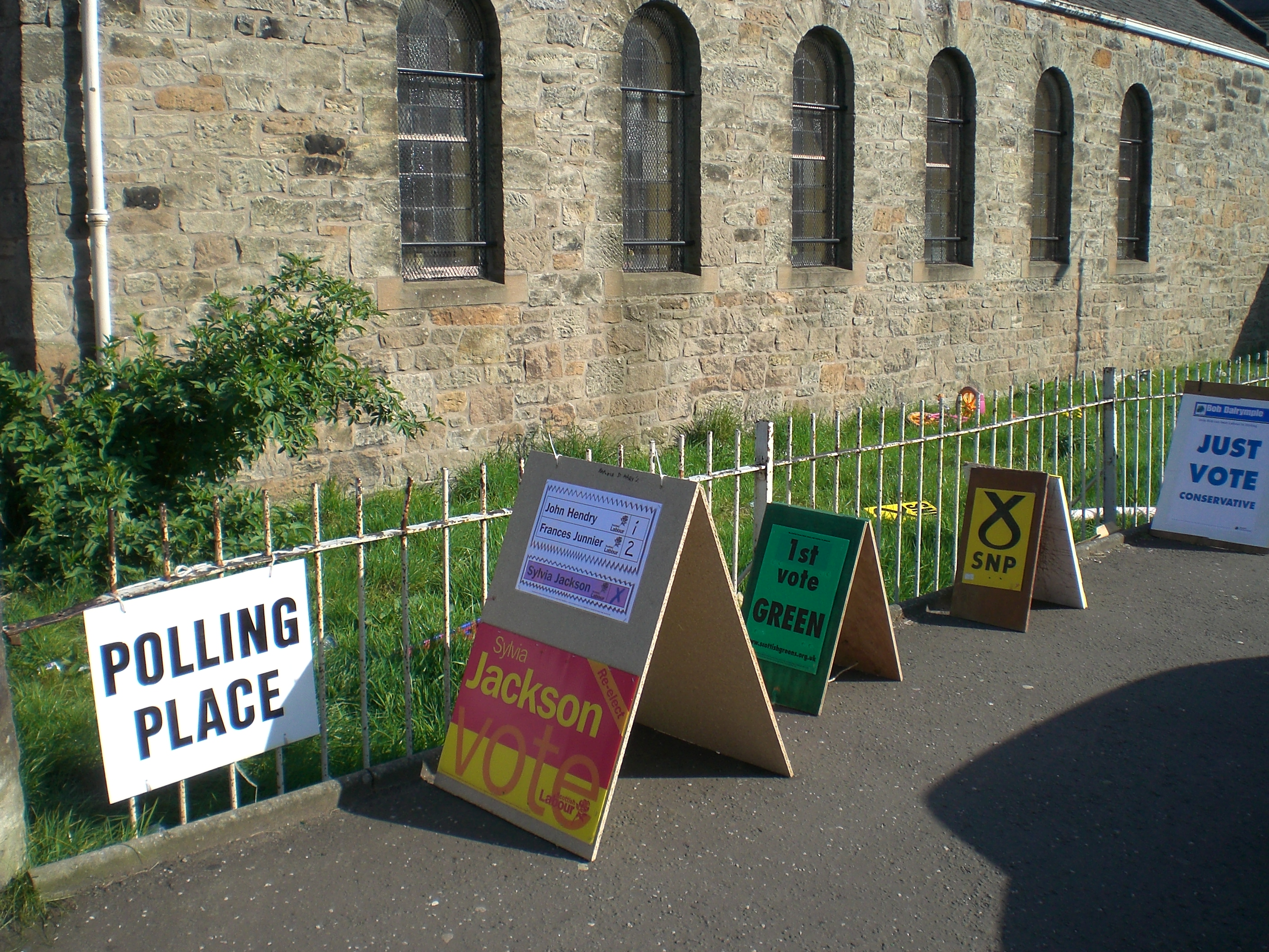 Exterior do colexio electoral de St. Marks Church Hall, en Stirling, durante as eleccións ao Parlamento escocés do gl:3 de maio de gl:2007